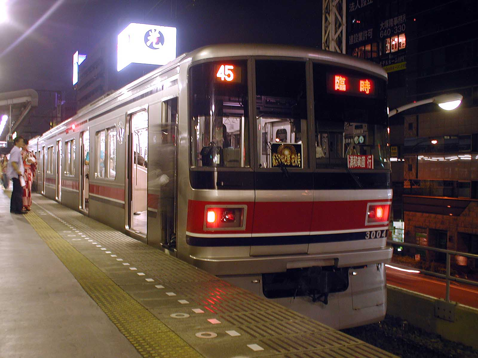 2003年7月20日に浦和美園 - 桜木町間で運行された臨時列車「横浜みなと祭花火号」。東急東横線の横浜 - 桜木町間は2004年1月に廃止され、同年2月の横浜高速鉄道みなとみらい線への直通運転に切り替わったため、浦和美園発着のみなとみらい号の前身となった。